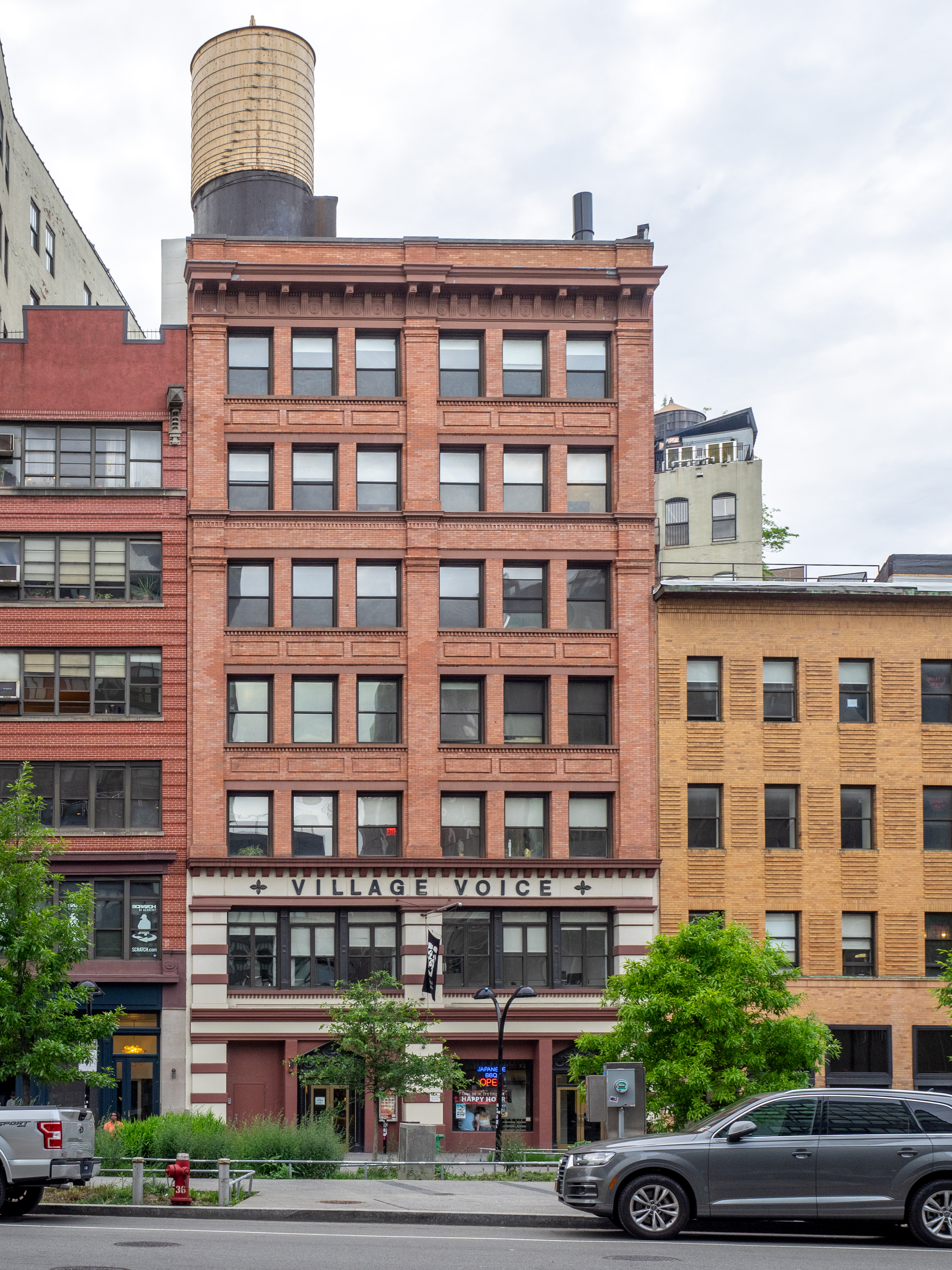 NoHo, NYC